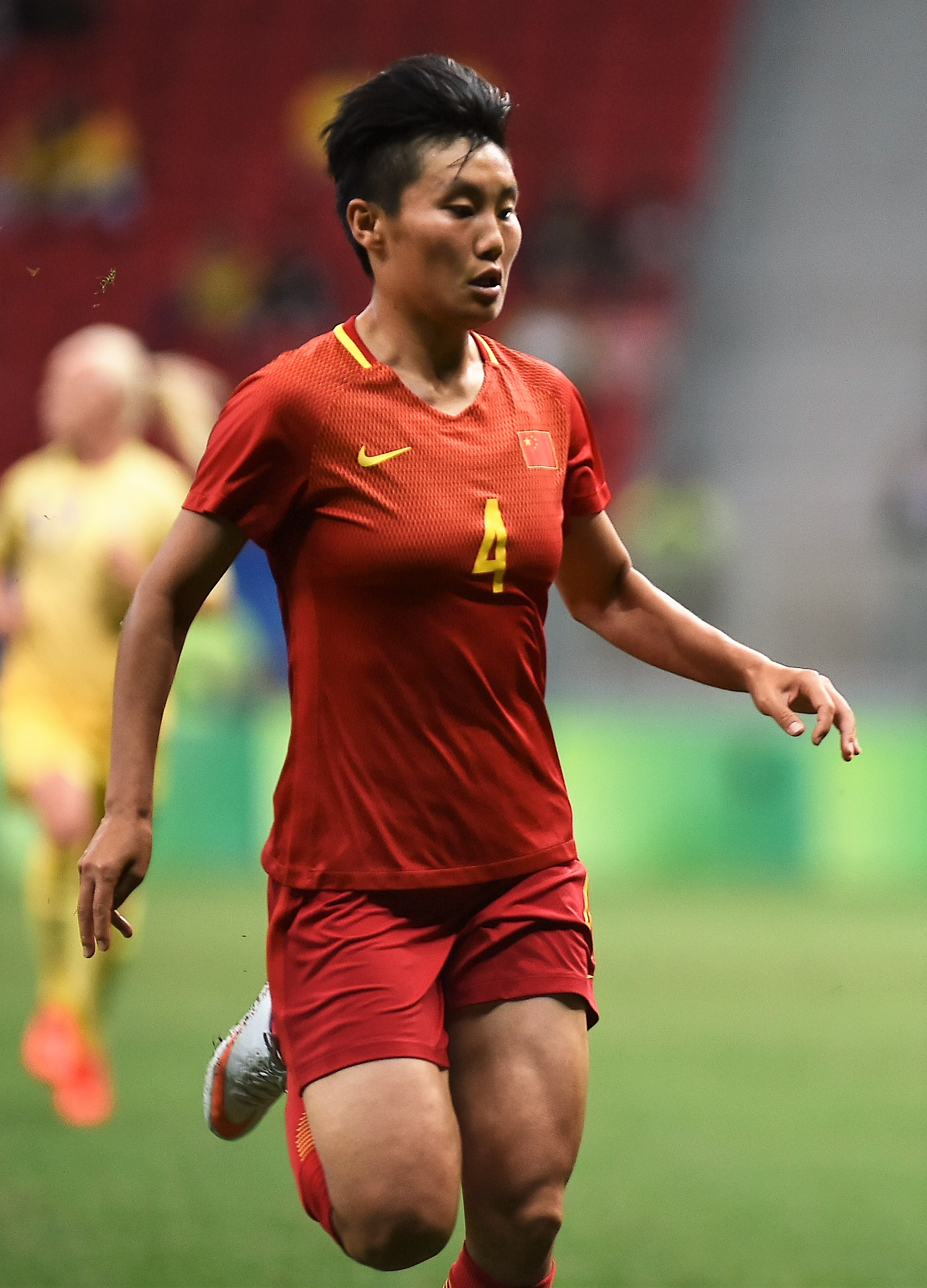 Estádio Nacional de Brasília Mané Garrincha, Brasília, DF, Brasil, 9/8/2016 Foto: Andre Borges/Agência Brasília China e Suécia jogam nesta terça-feira (9), no Estádio Mané Garrincha, pelo grupo E do futebol feminino nas Olimpíadas 2016.